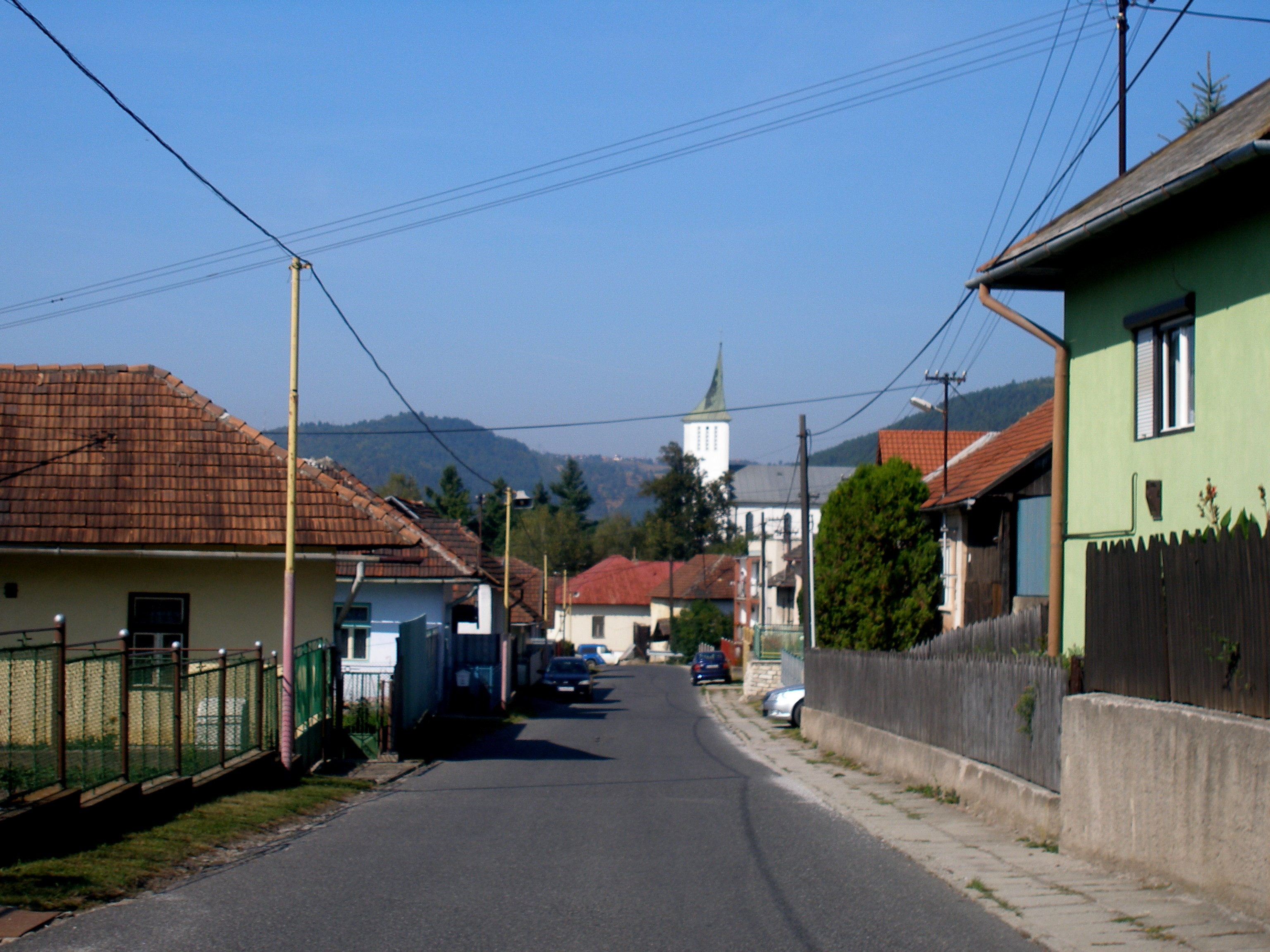 Spišská obec Richnava okres Gelnica.